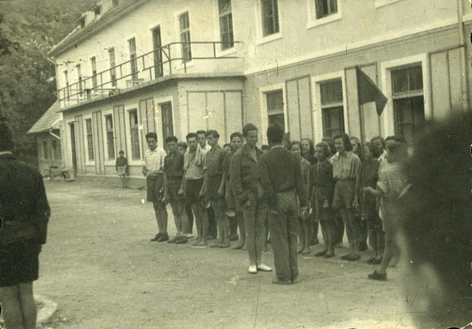 Jutranji zbor I. koroške mladinske delovne brigade Pavla Žaucerja Matjaža - komandir čete Janko Zorman raportira dežurnemu.